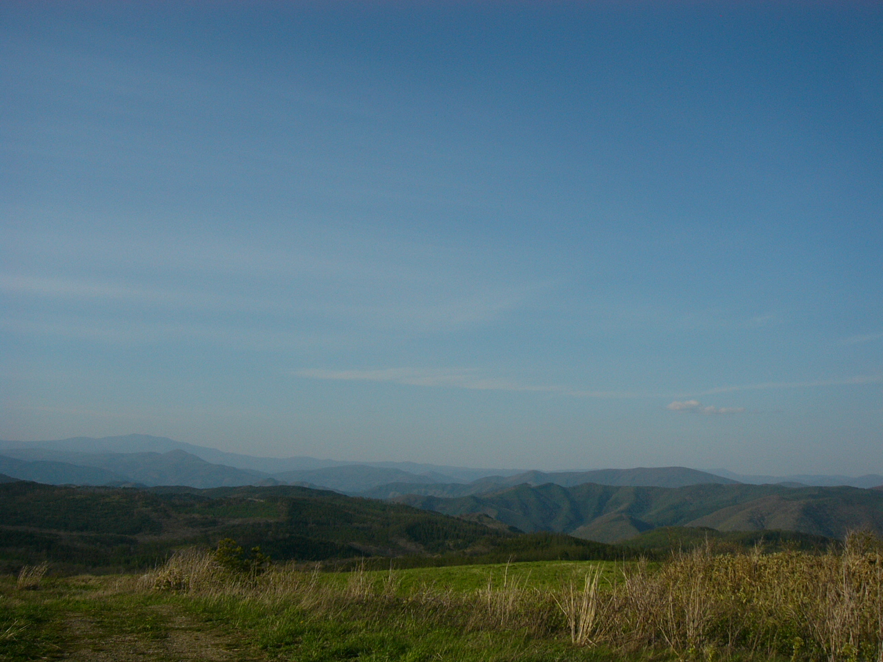 北上山地、種山から北東方面を望む